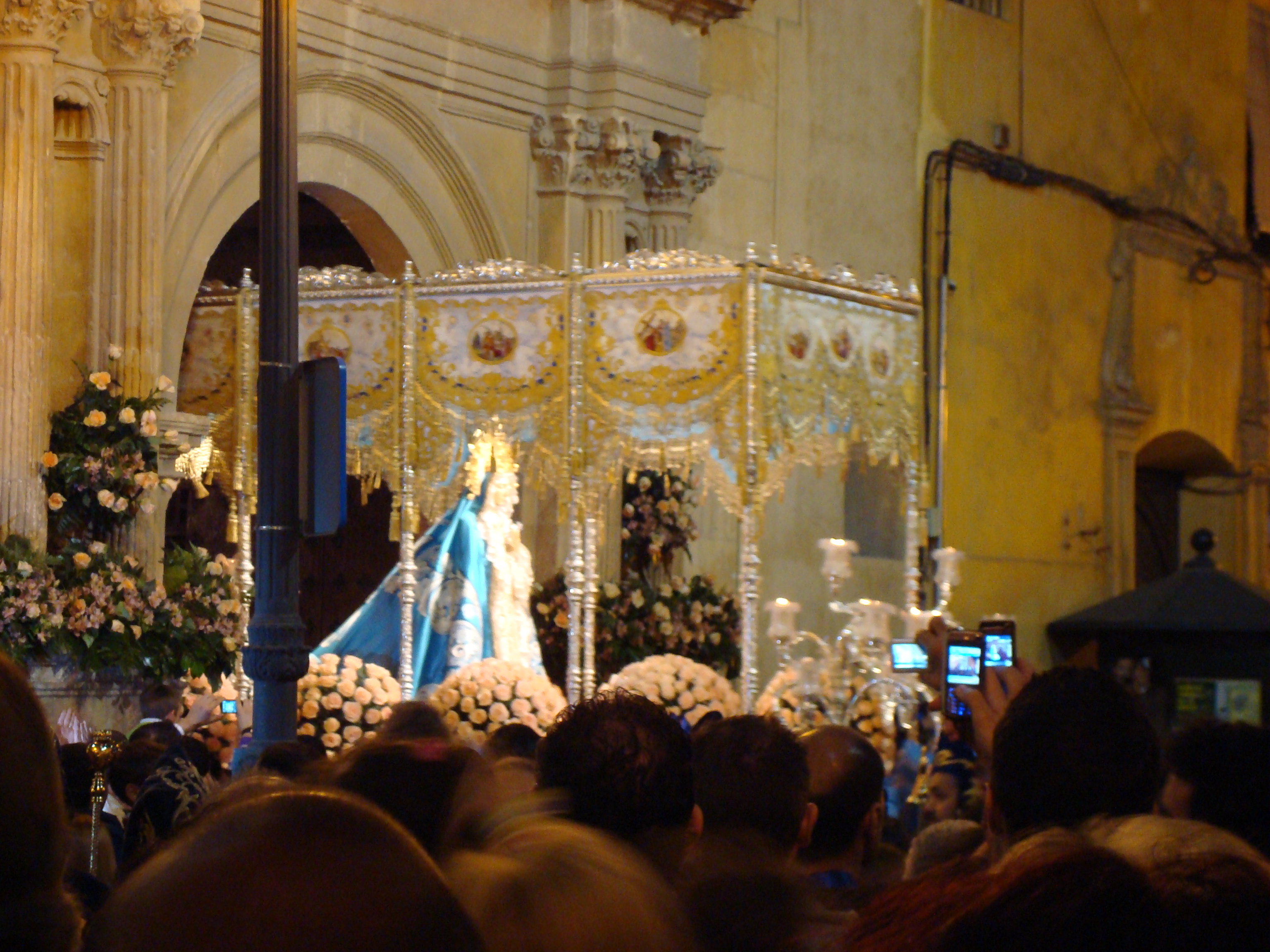 La Virgen de los Dolores, patrona del Paso Azul de Lorca, sale de la Iglesia de San Francisco para desfilar en procesión.